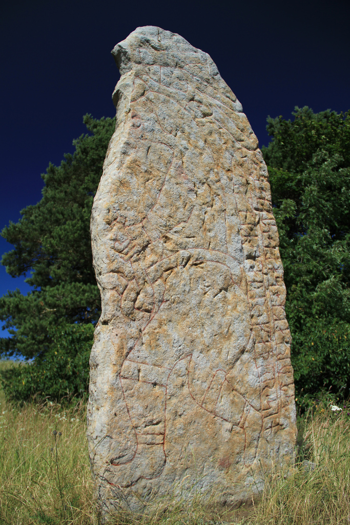 Runestone Vg 56 in Källby, Västergötland, Sweden Runsten